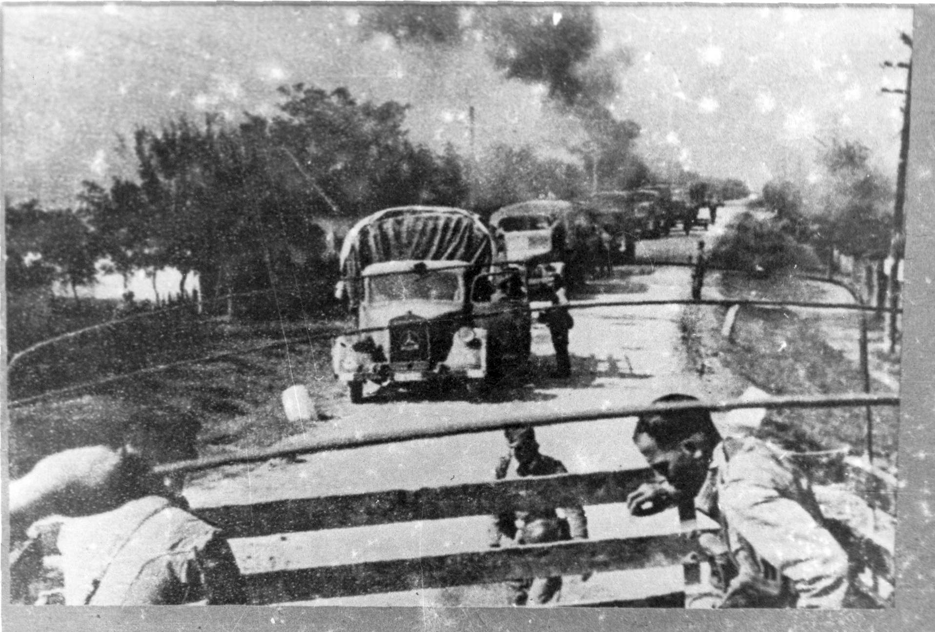 Srpskohrvatski / српскохрватски: Немачка војска пали села по Мачви 1941.